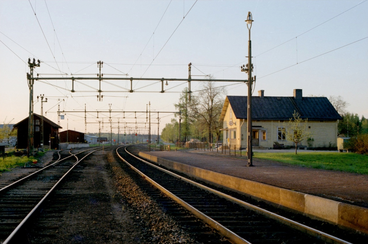 Hovsta station är en driftplats och tidigare trafikplats i Hovsta på Mälarbanan, cirka 8 kilometer från Örebro centralstation. Den 22 maj 1977 upphörde persontrafiken vid stationen och stationen övergick till att bli en driftplats. År 1985 eller 1986 revs stationshuset.